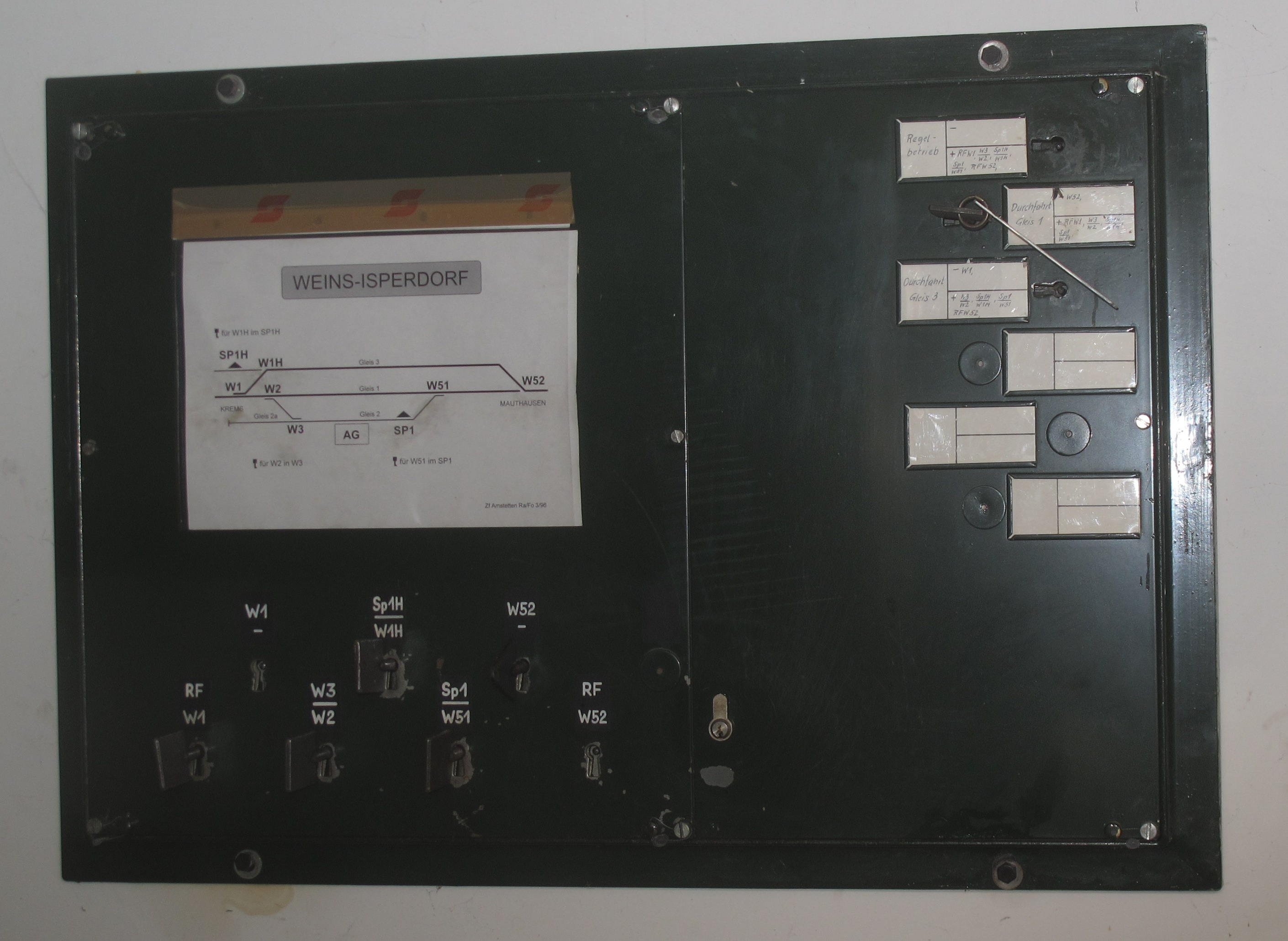 Zentralschloss in Österreich mit drei verschiedenen Fahrwegen (Gleis 1, Gleis 3, Richtungsbetrieb über Rückfallweichen)